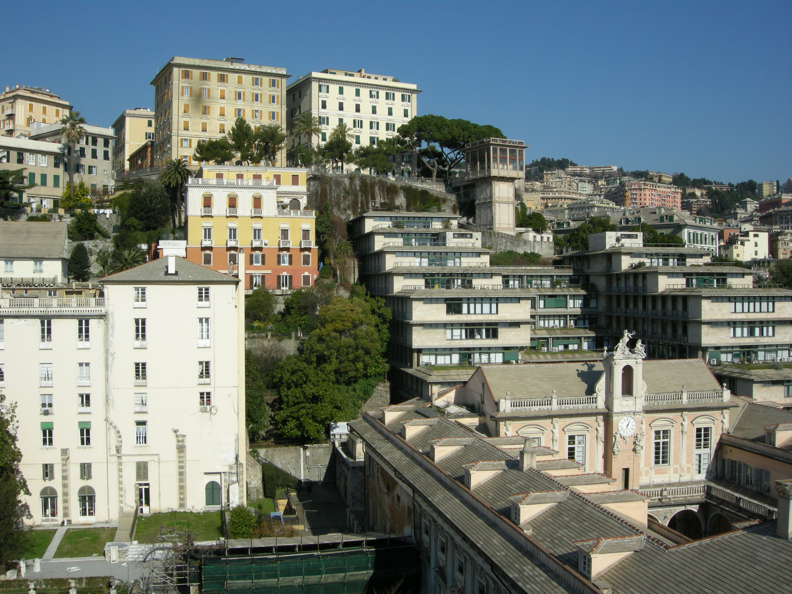 Veduta dalla terrazza sul tetto di palazzo rosso